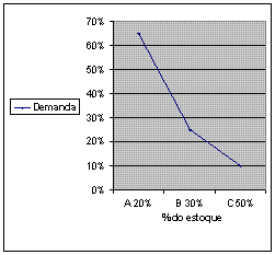 A imagem Curva ABC.GIF foi criada por mim no software Excel e formatada em arquivo .gif no software Paint. Sem problemas com direitos autorais.